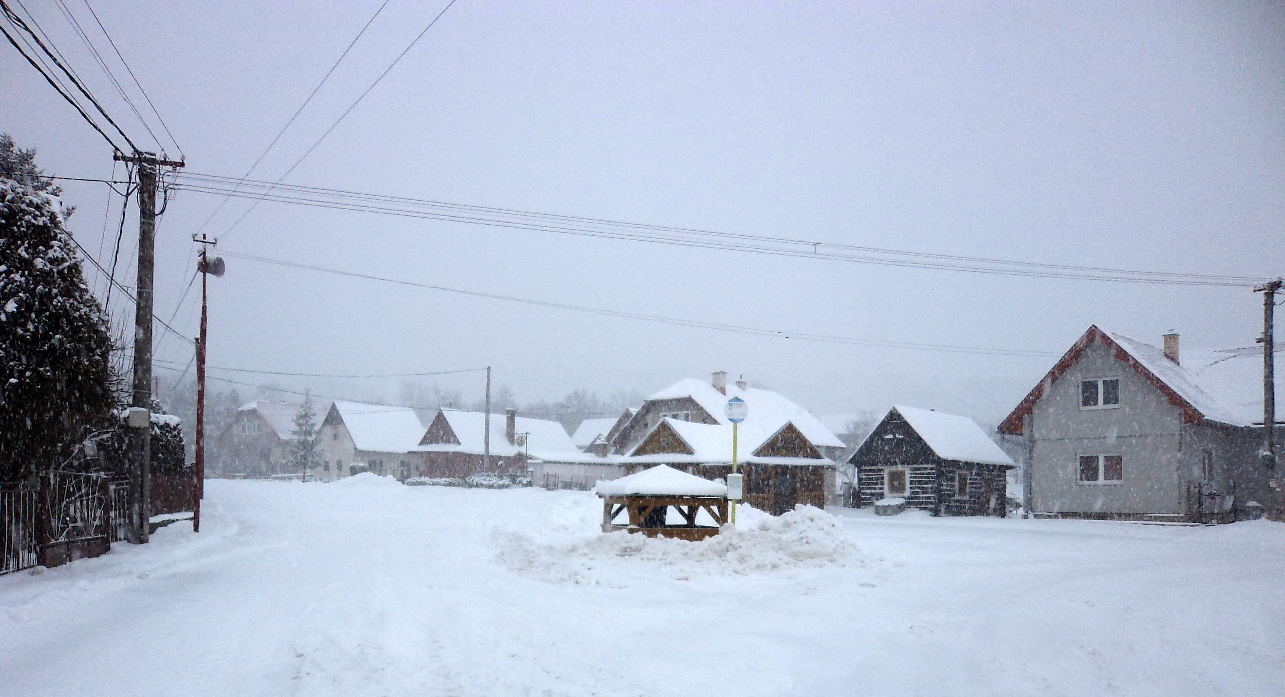 Námestie vo Folkušovej v zime